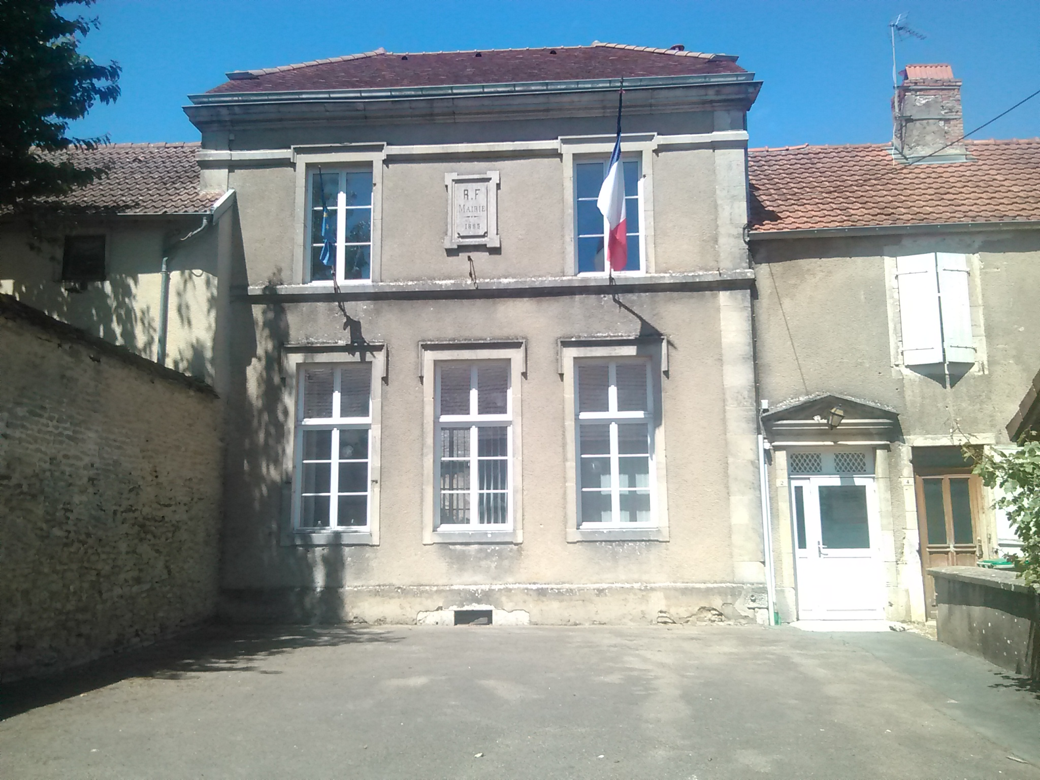 mairie de Chalancey